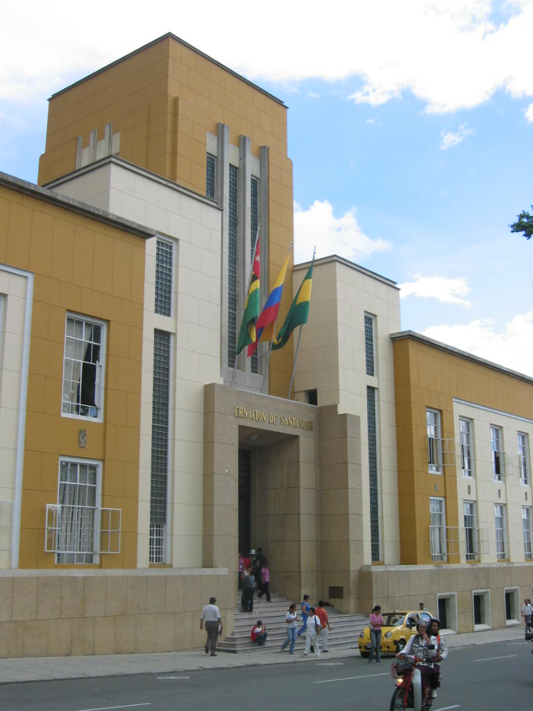 Gobernacion del departamento de Santander, Colombia.